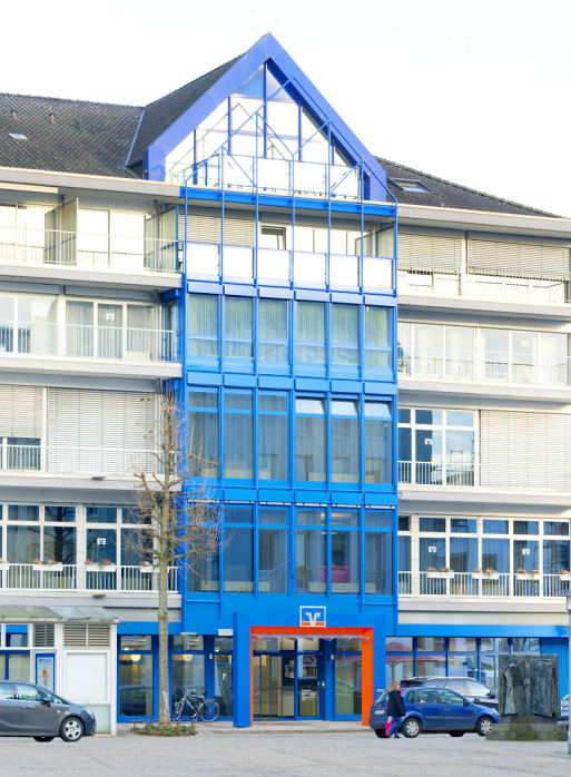 Sitz der Volksbank Rhein-Lippe eG am Großen Markt in Wesel